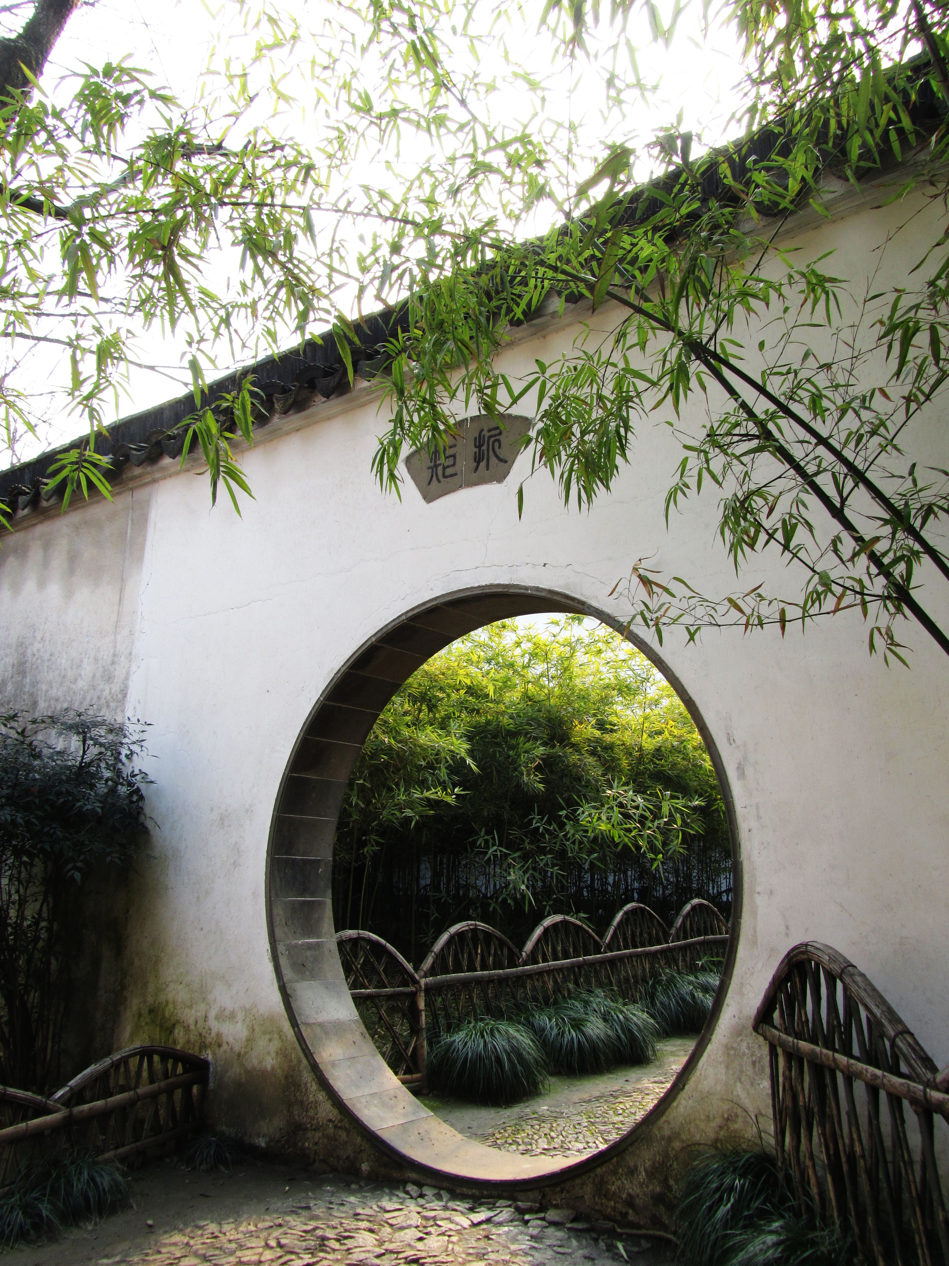 苏州沧浪亭中的一处月亮门。